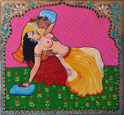 kama sutra